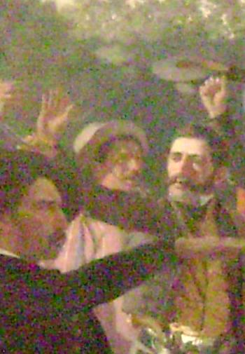 Adrián Medina (detalle de la obra El Juramento de los Treinta y Tres Orientales, óleo de Juan Manuel Blanes)